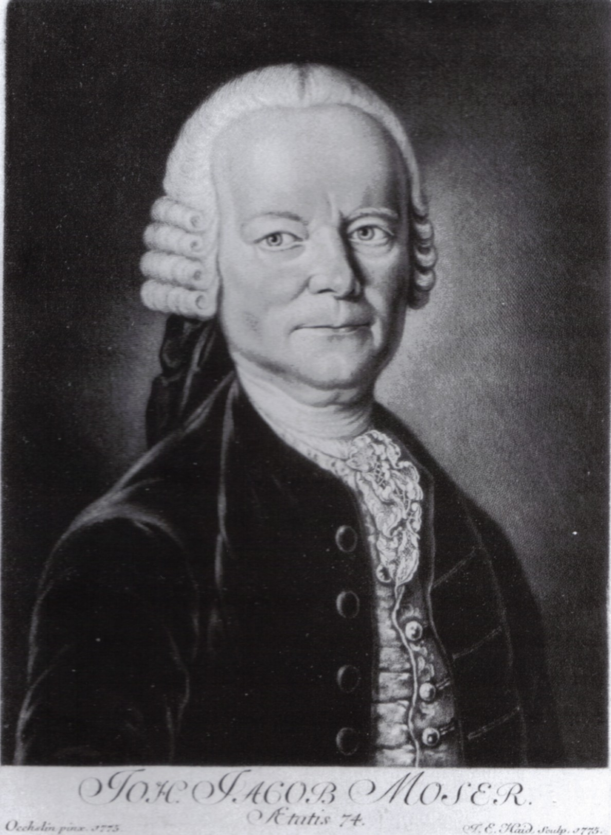 der deutsche Staatsrechtler Johann Jakob Moser (Schabkunstblatt nach einem Gemälde)